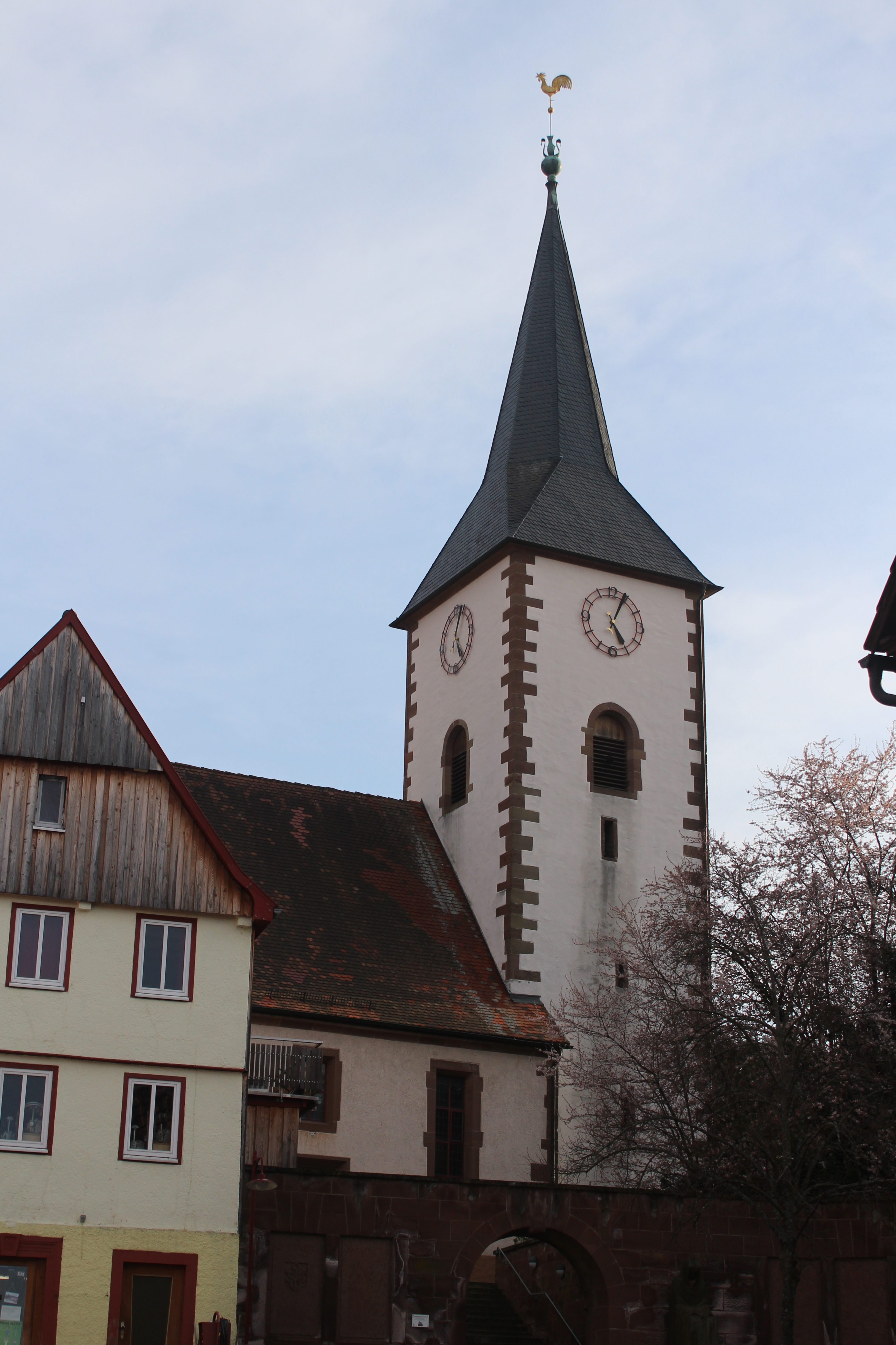 Kirche Sankt Mauritius in Wiernsheim